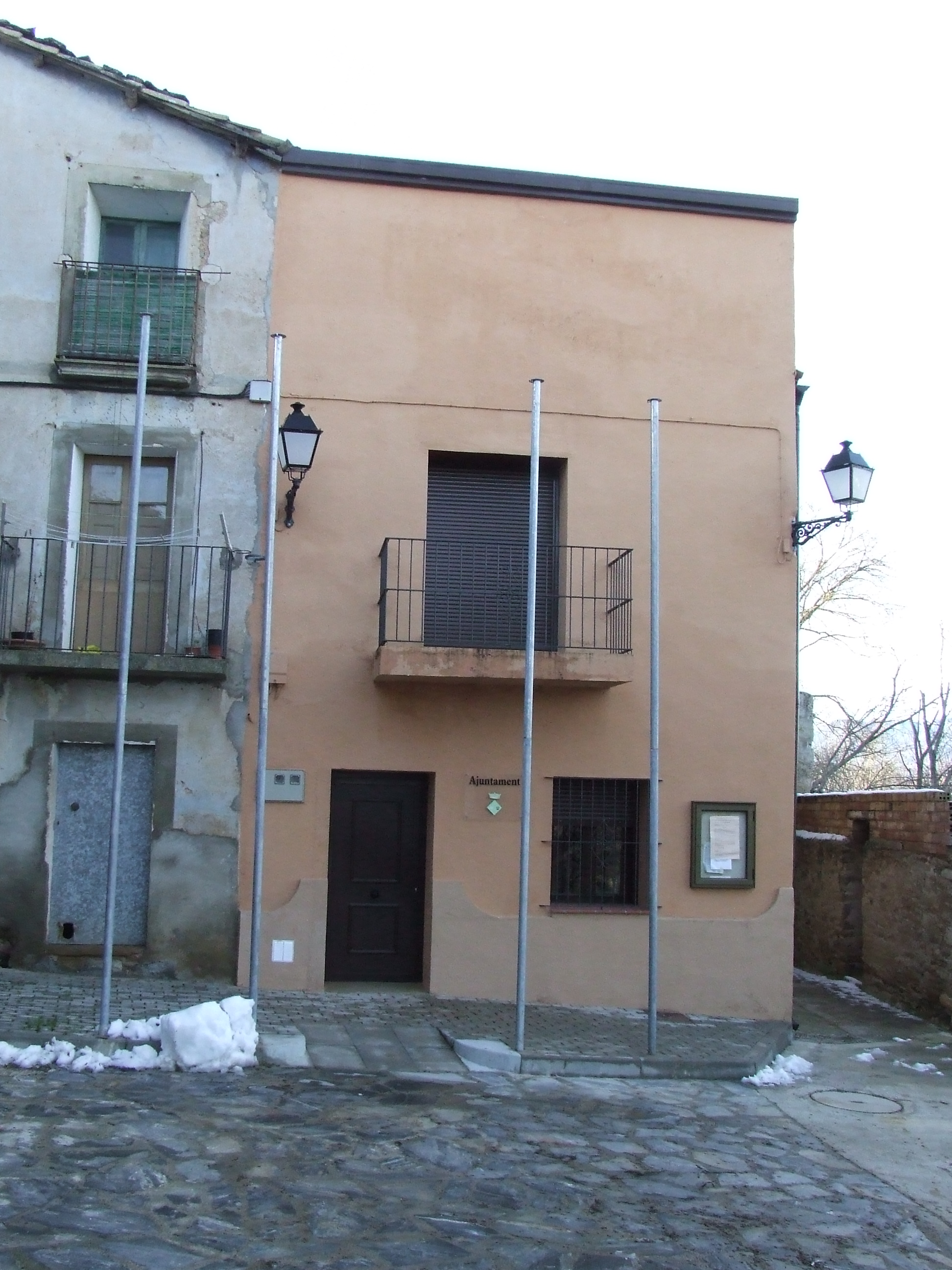 Restes dels accessos a l'interior del poble clos (Gavet, Sant Serni, Gavet de la Conca, Pallars Jussà)